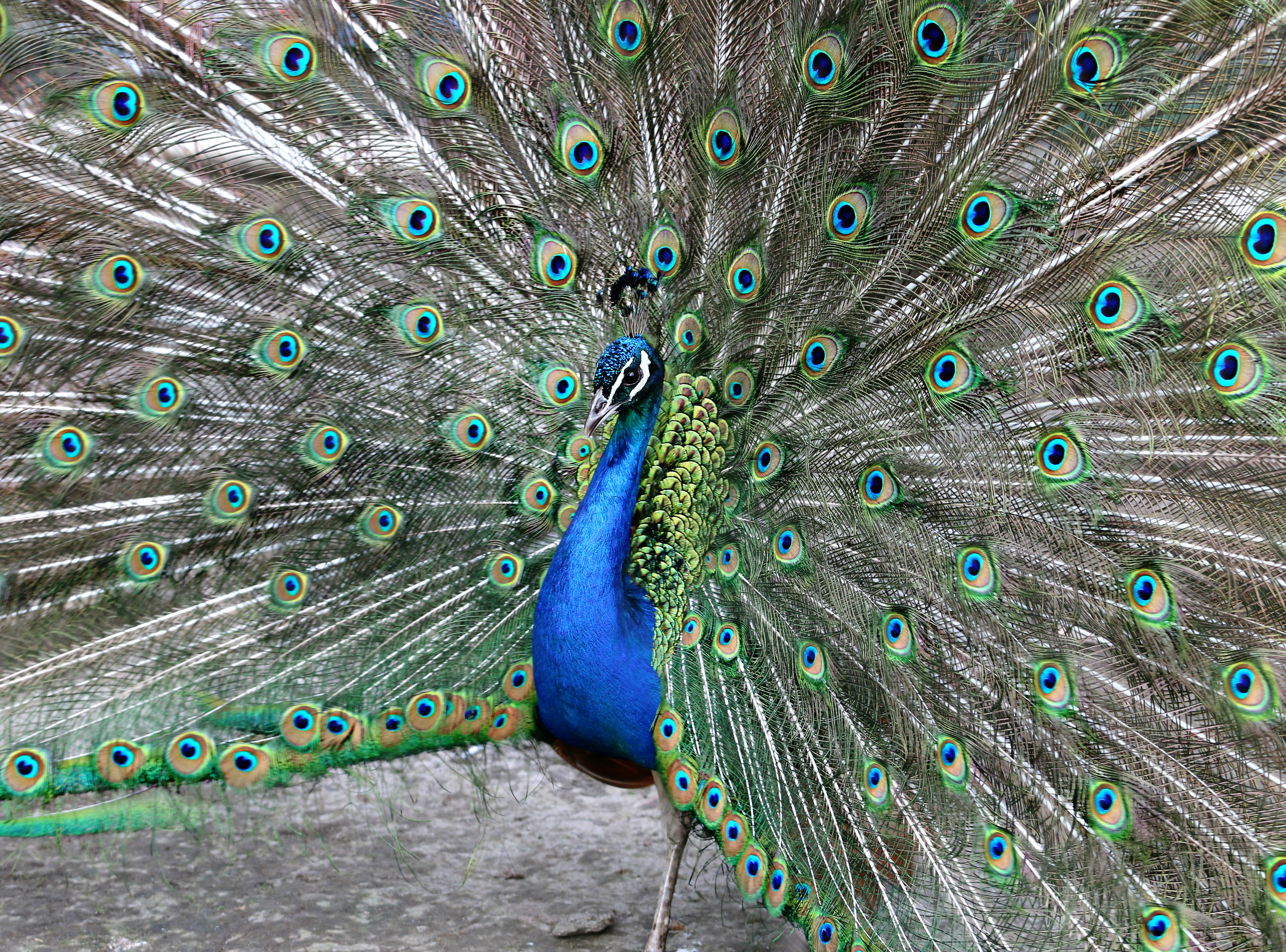 Павлин обыкновенный в Московском зоопарке.